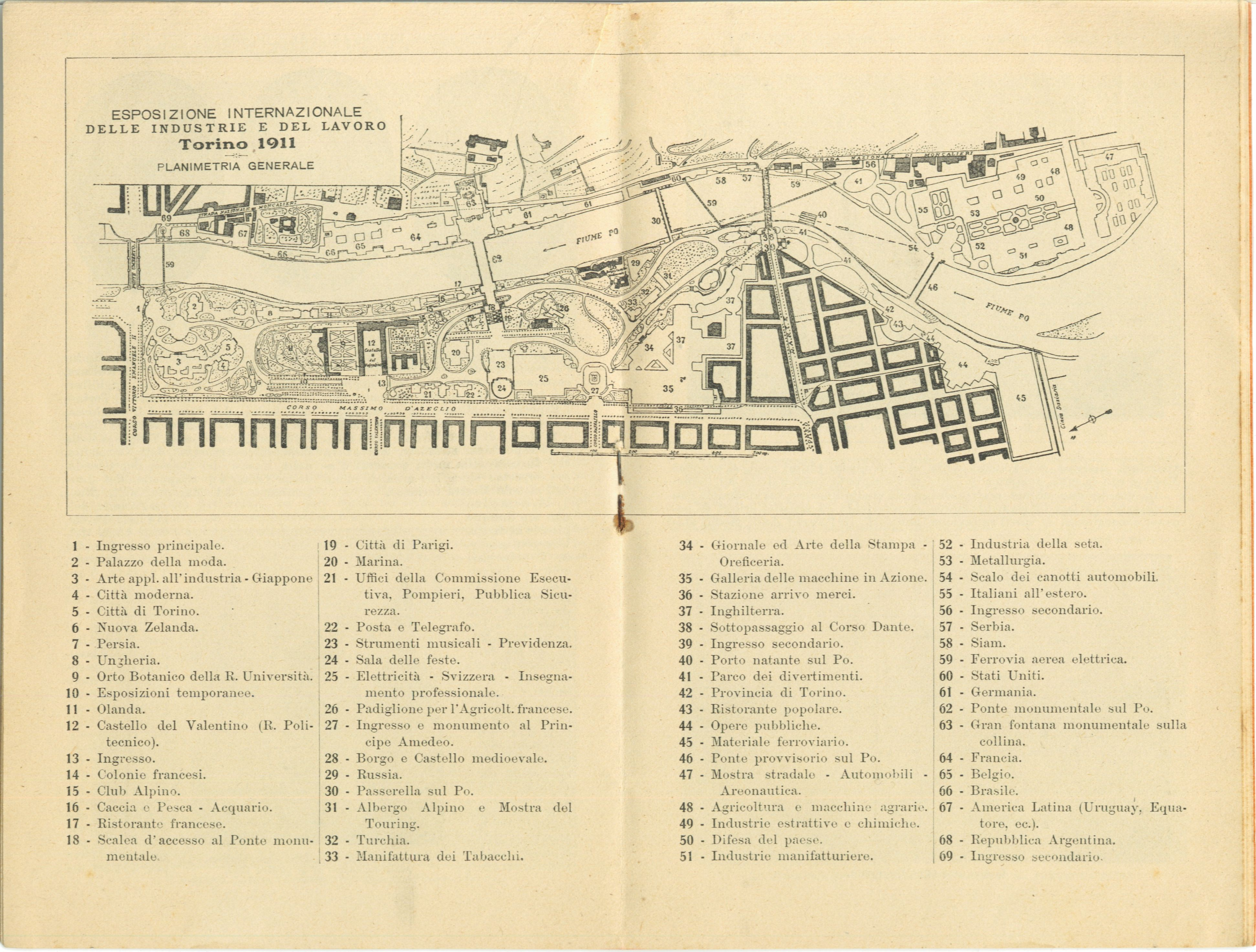 La cartina topografica dell'esposizione internazionale di Torino del 1911